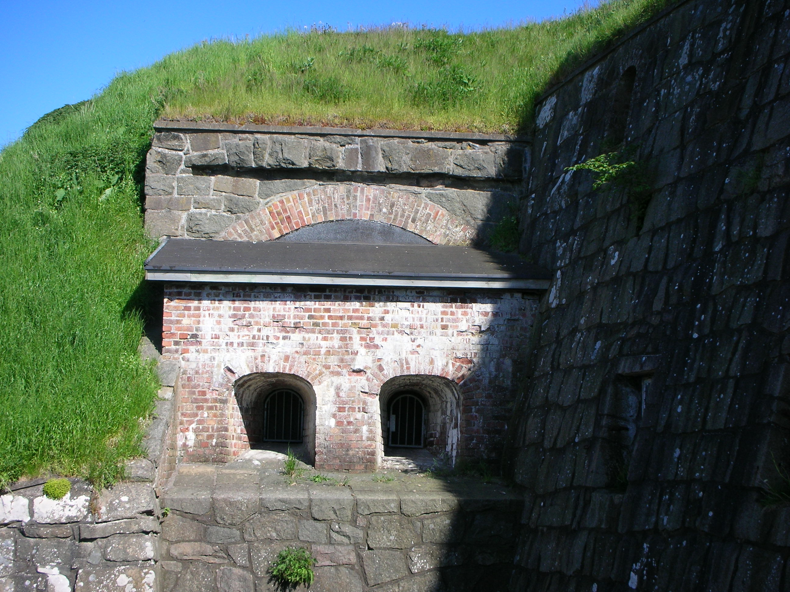 Varbergs fästning